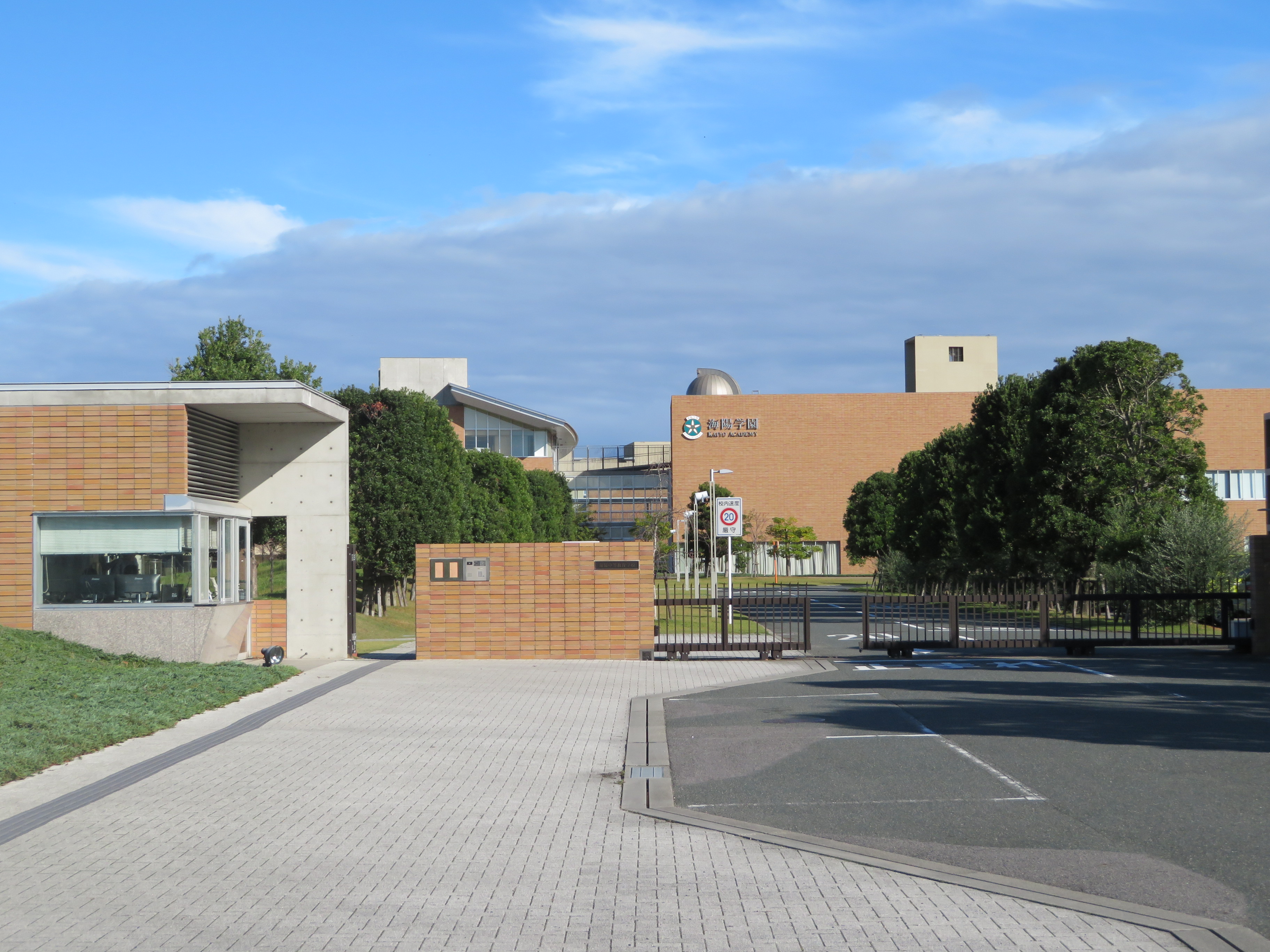 海陽中等教育学校。愛知県蒲郡市。